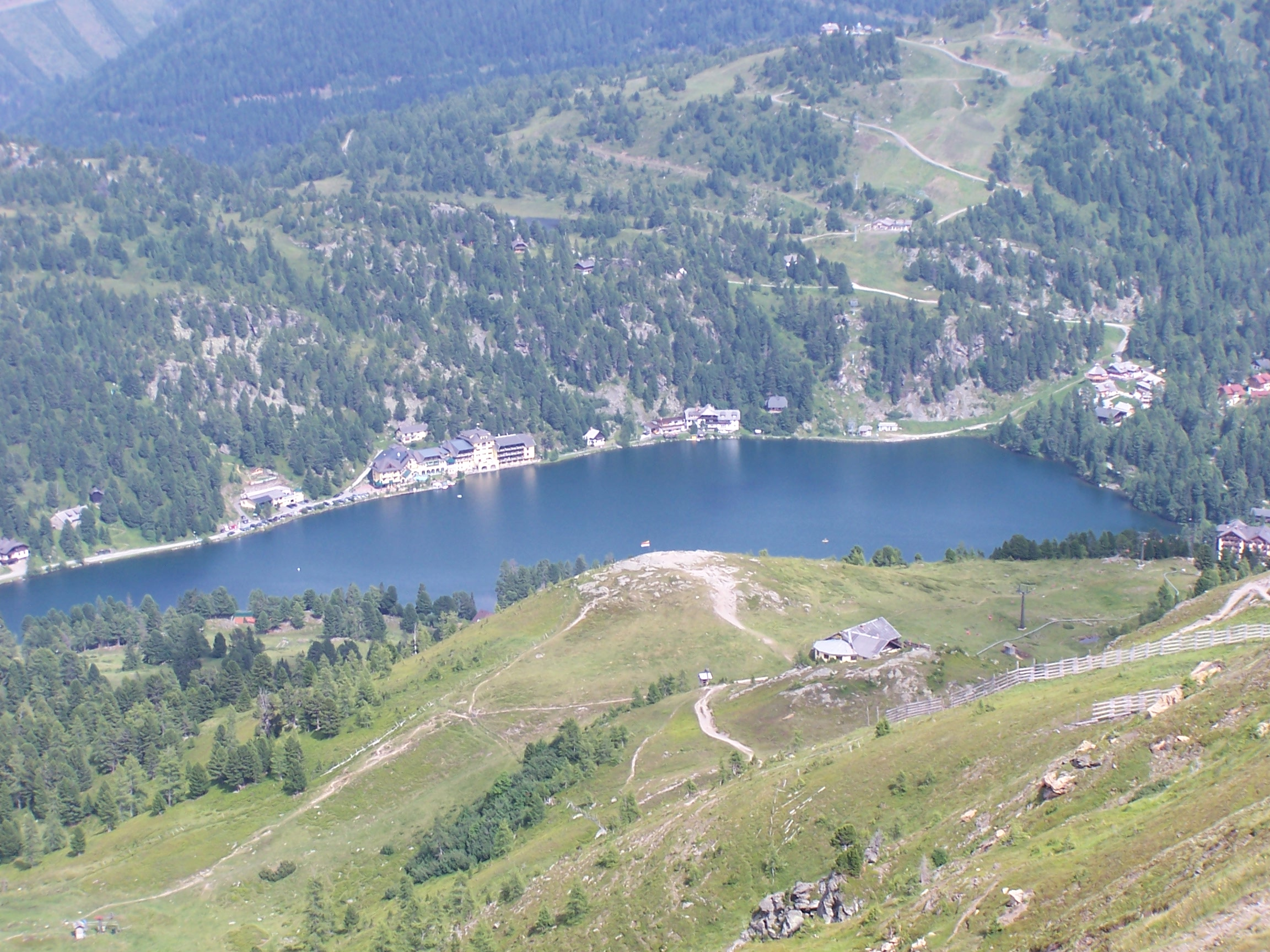 Blick auf Turracher See und das Ostufer